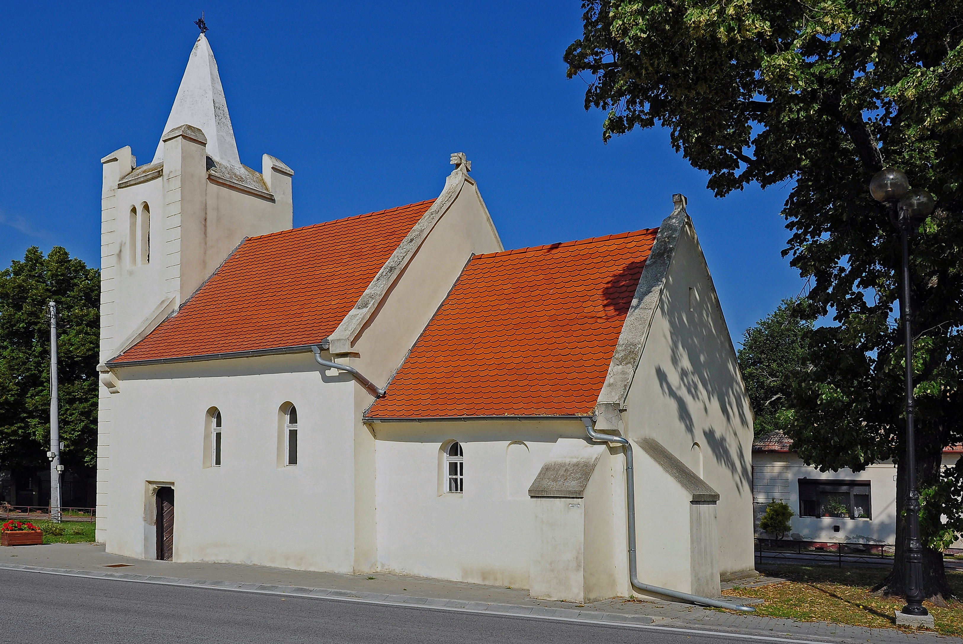 Pôvodne románsky, neskôr goticky prestavaný kostol Navštívenia Panny Márie z prvej polovice 13. storočia.